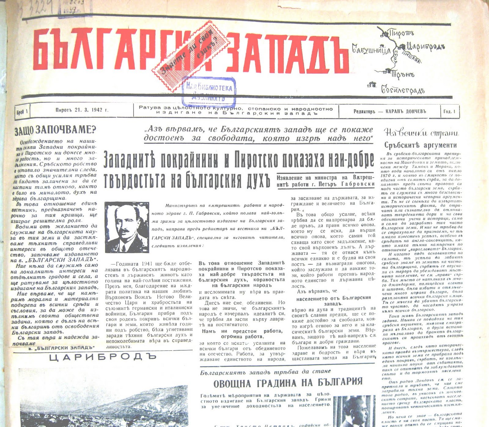 Вестник „Български запад“, брой №1.